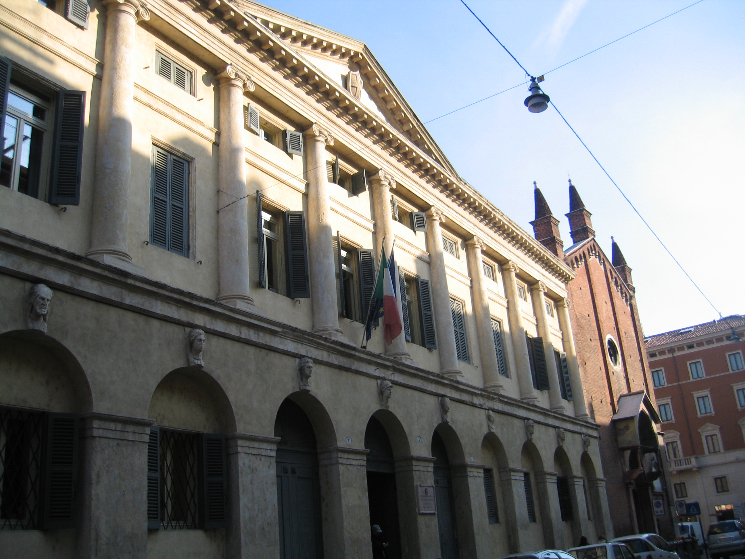 Conservatorio musicale "Dall'Abaco" di Verona, sito in via Massalongo